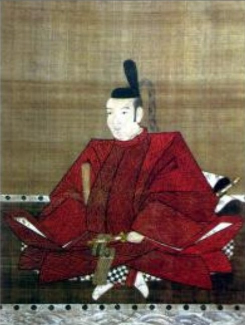 松平忠清の肖像。